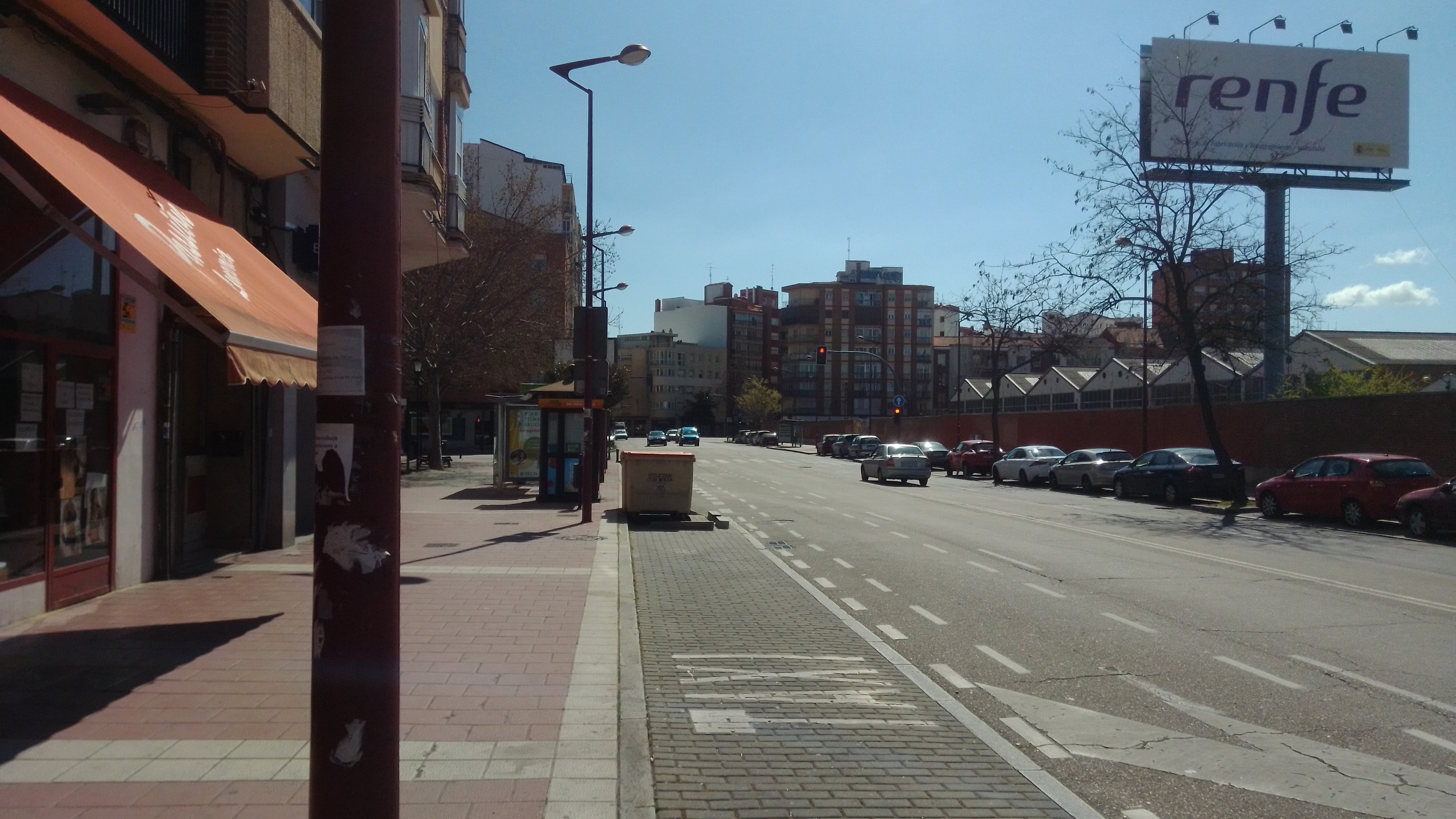 Valladolid durante la cuarentena de 2020